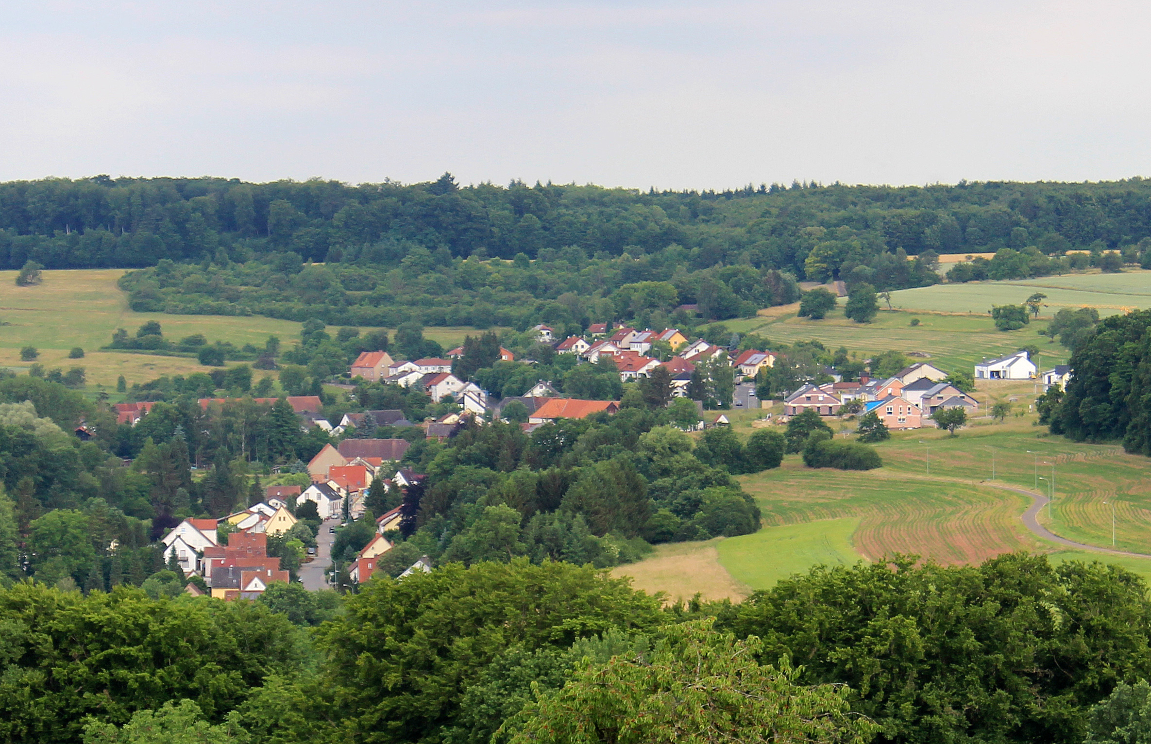 Ansicht von Hengstbach, Stadt Zweibrücken, Rheinland-Pfalz